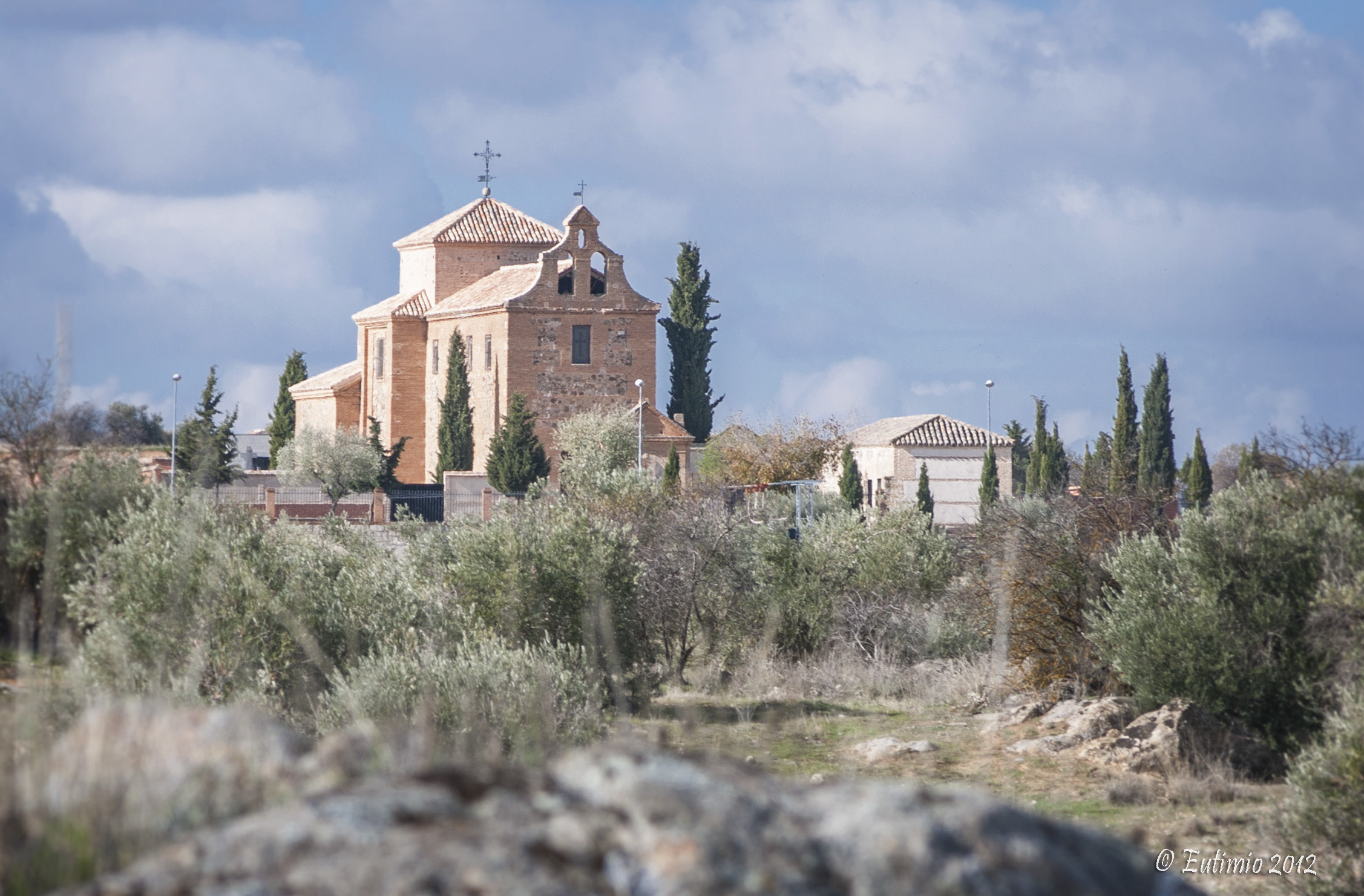 Camino de la ermita.